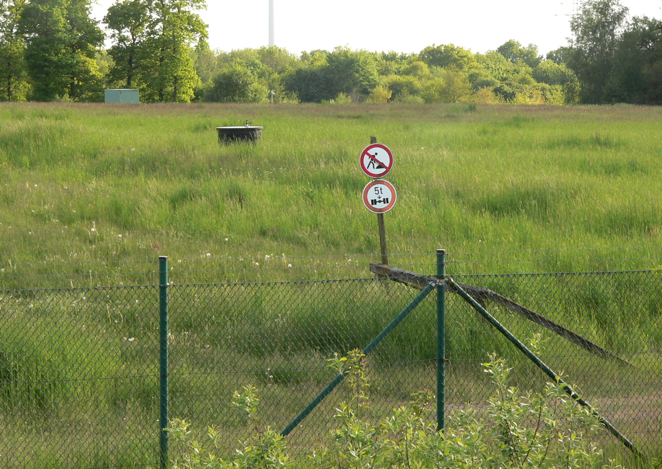 Messanlagen auf dem Gelände der Sonderabfalldeponie Münchehagen